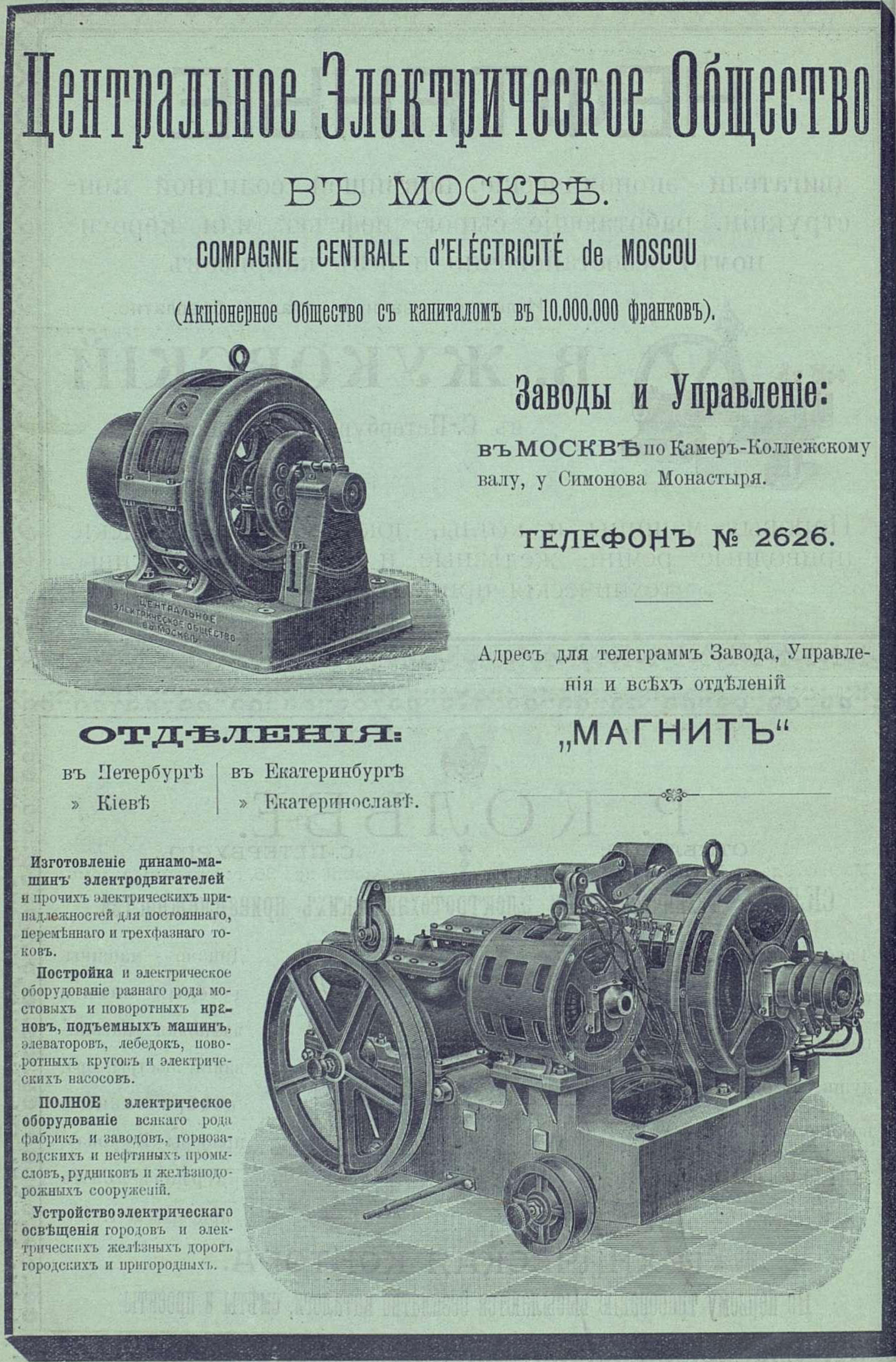 Реклама Центрального электрического общества, 1903 год.